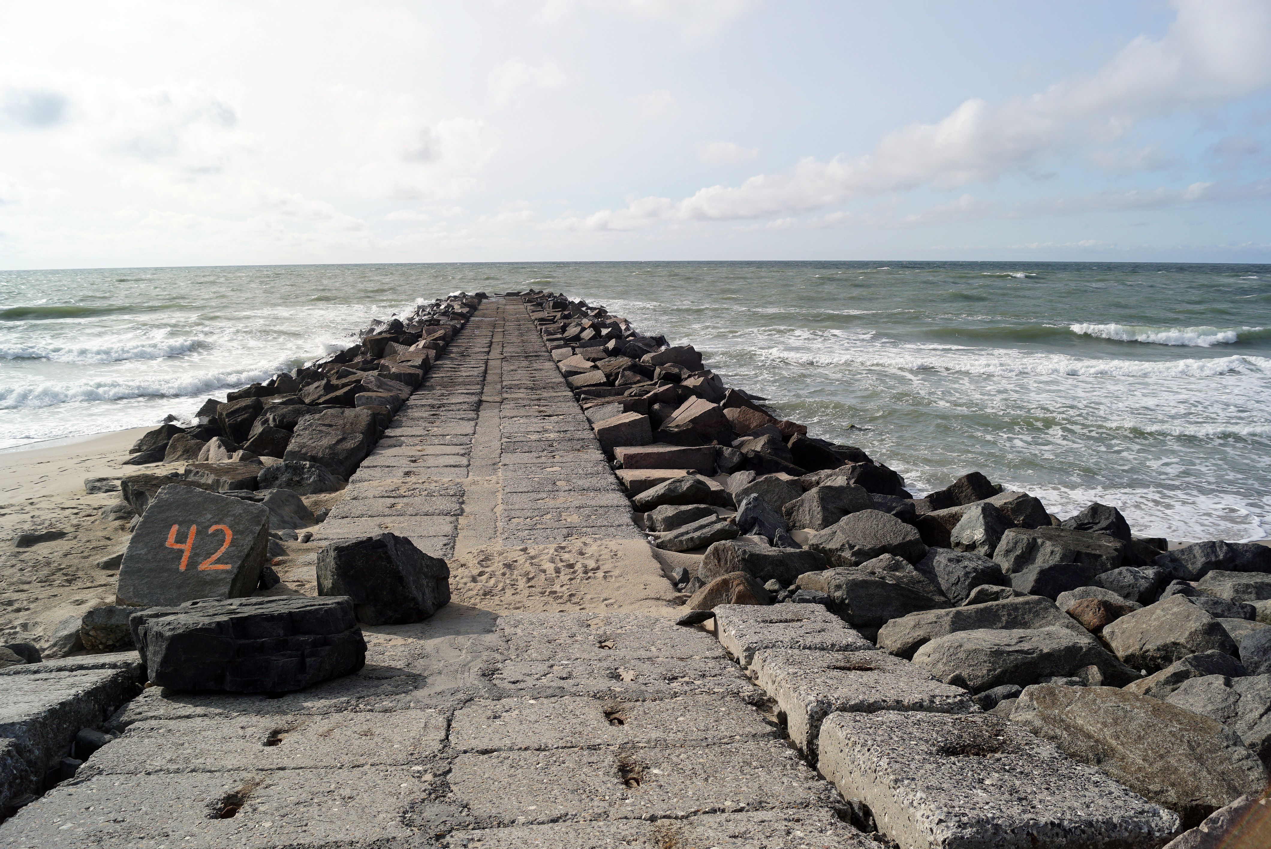 Høfde 42 ved Harboøre Tange